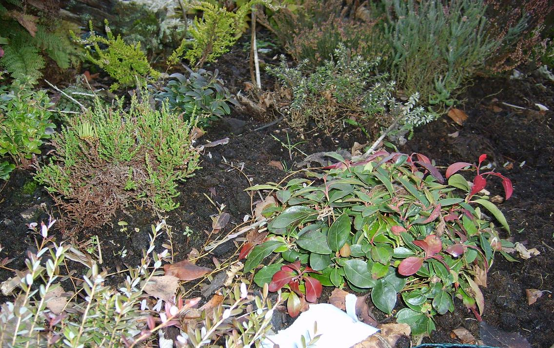 Surbundsbed nærbillede